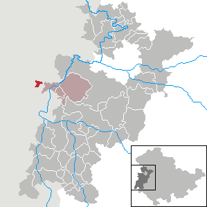 Großensee in Thuringia - Wartburgkreis